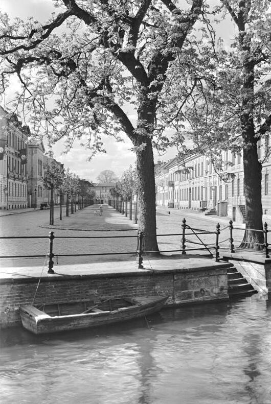 Potsdam.- Am Kietz